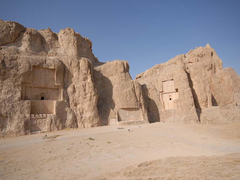 tombeaux de naqsh e rostam